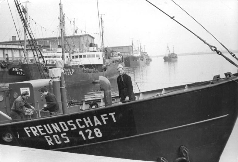 Rostock, Hafen, Fischhallen, Logger Zentralbild Rostock-Löwe 26.4.1956 Me-Sch.-1759 A.V.- Rotbarschsaison hat im Fischkombinat in Rostock begonnen. Annähernd 40.000 Zentner gefangenen Rotbarsch aus dem Nordmeer landen die Hochseefahrzeuge des Fischkombinates Rostock diese Woche an. Allein 19.000 Zentner brachten die Trawler ROS 208, 204, 214 und 202 von den Fangplätzen nach Hause. Mit diesem großen Fischzug hat die Rotbarschsaison in diesem Jahr einen vielversprechenden Anfang genommen. In Tag- und Nachteinsätzen sind die Löschbrigadenim Kombinatshafen dabei, den reichen Meeressegen aus den Schiffsrümpfen zu bergen und in die bereitstehenden Thermoswagen der Reichsbahn zu verfrachten. Einheiten der in Rostock stationierten VP-See helfen den Arbeiterinnen an Land beim Bewältigen dieser reichen Fischmengen. In gemeinsamer Arbeit gelang es ihnen, innerhalb von 24 Stunden 300.000 Kilo Rotbarsch von den ständig einlaufenden Hochseefahrzeugen zu löschen und zum Versand zu bringen. UBz: Blick in den Kombinatshafen. Ein Logger mit Rotbarschladung läuft ein.